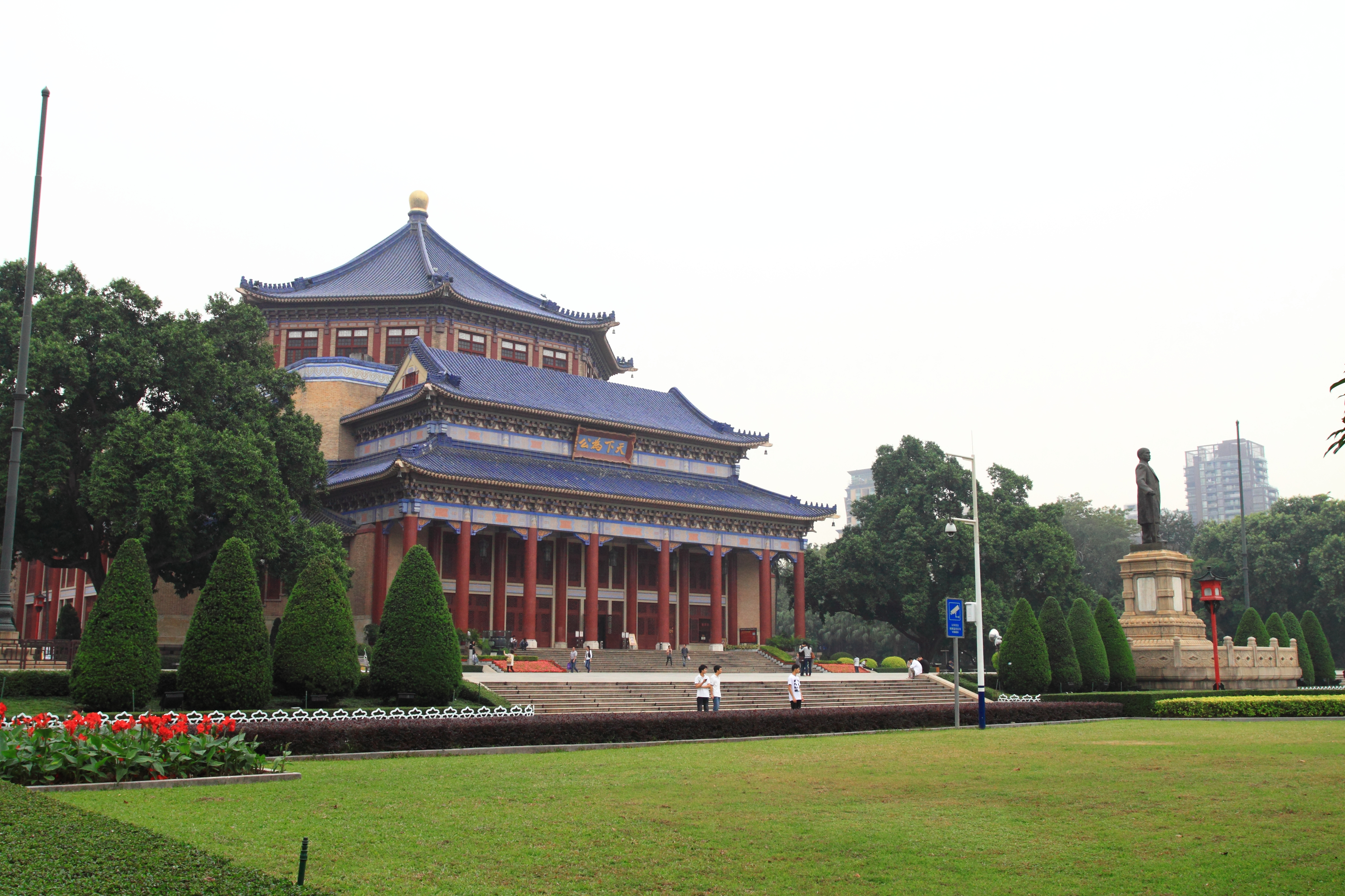 广州中山纪念堂 —— 南面